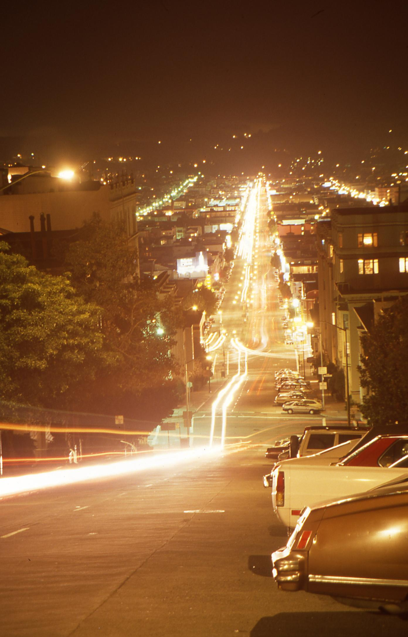 Steile Straße in san Franzisko bei Nacht und quer zur Straße parkende Limousinen.